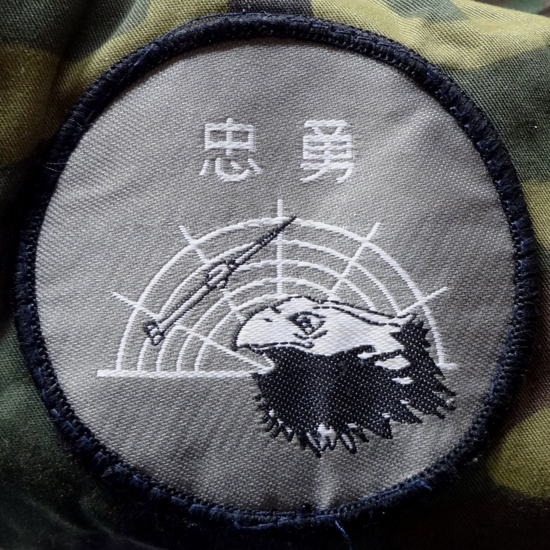 中華民國空軍防空砲兵指揮部（忠勇部隊）臂章。